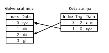 Centrālā procesora kešatmiņas diagramma